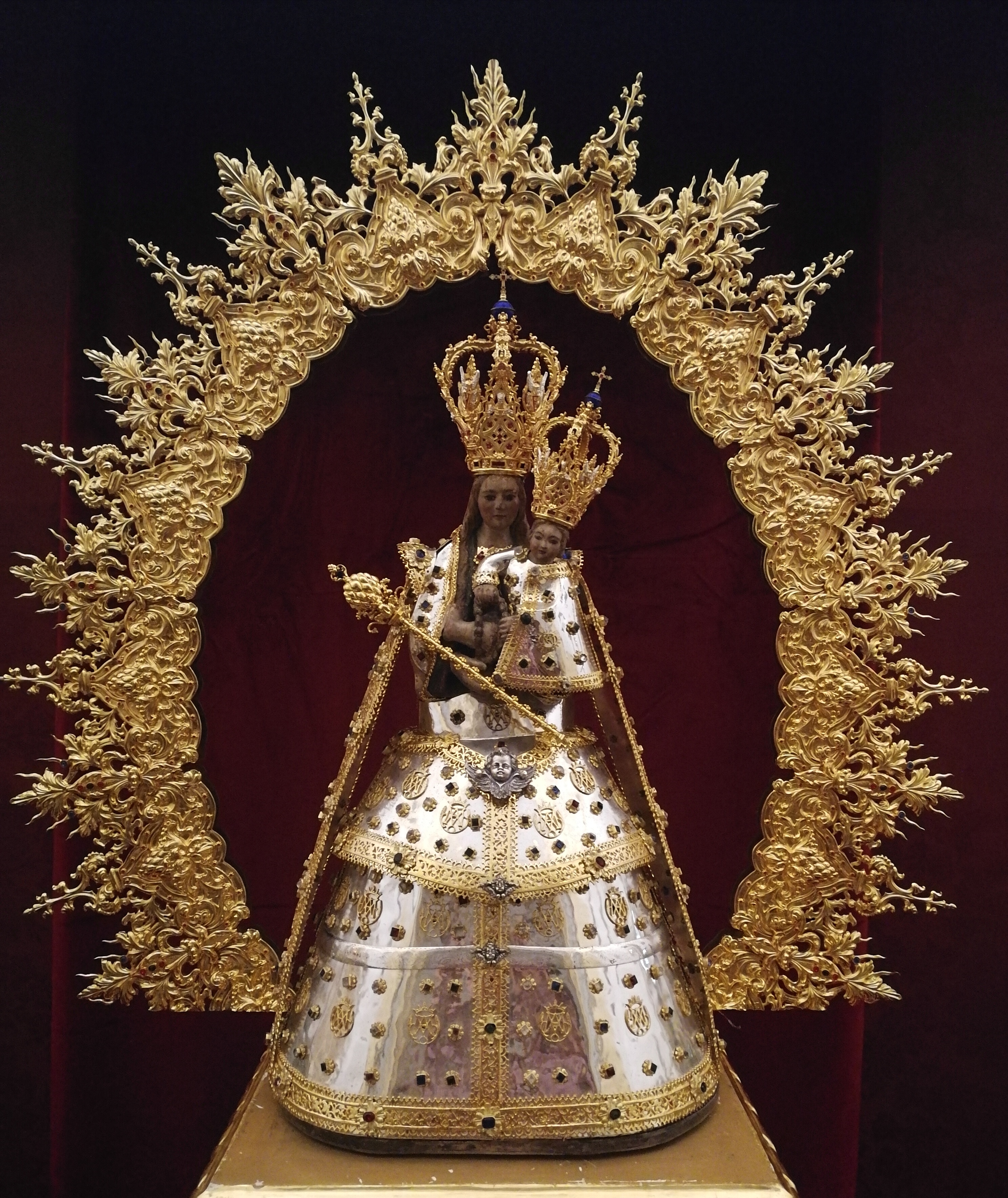 Ntra. Sra. de la Antigua Coronada, Patrona de Almuñécar.